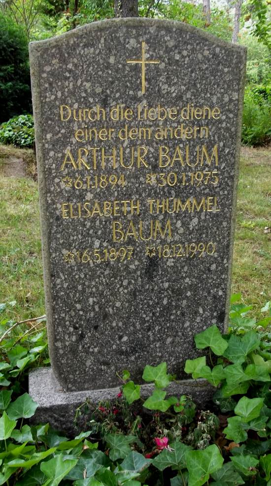 Grabstein von Marie-Elisabeth Thuemmel-Baum auf dem Leipziger Südfriedhof